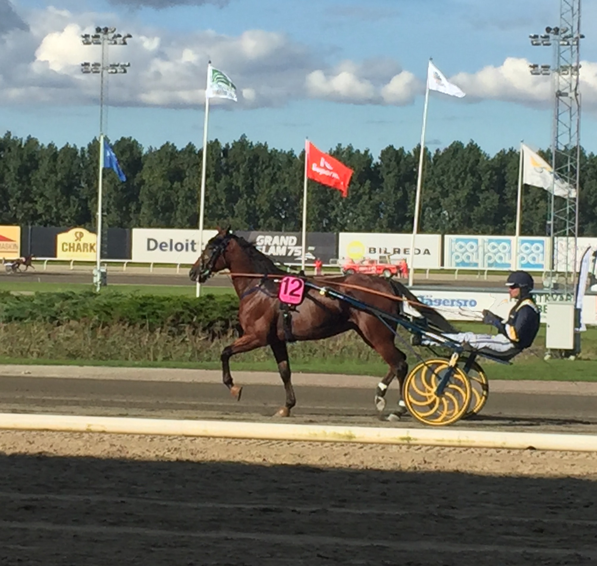 Björn Goop och hästen Test Drive (tränad av Stefan Melander) inför finalen av Svenskt Travderby 2017.